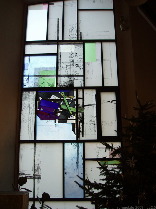 Katholische Kirche St. Michael in Heilbronn-Neckargartach, Glasfenster am Altar